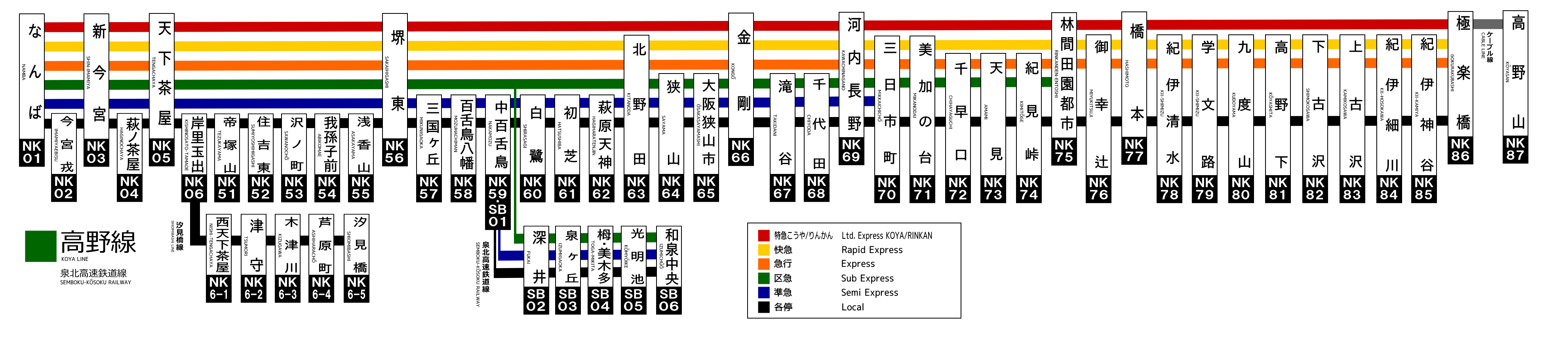 南海電鉄高野線路線図（2012.4.1~）